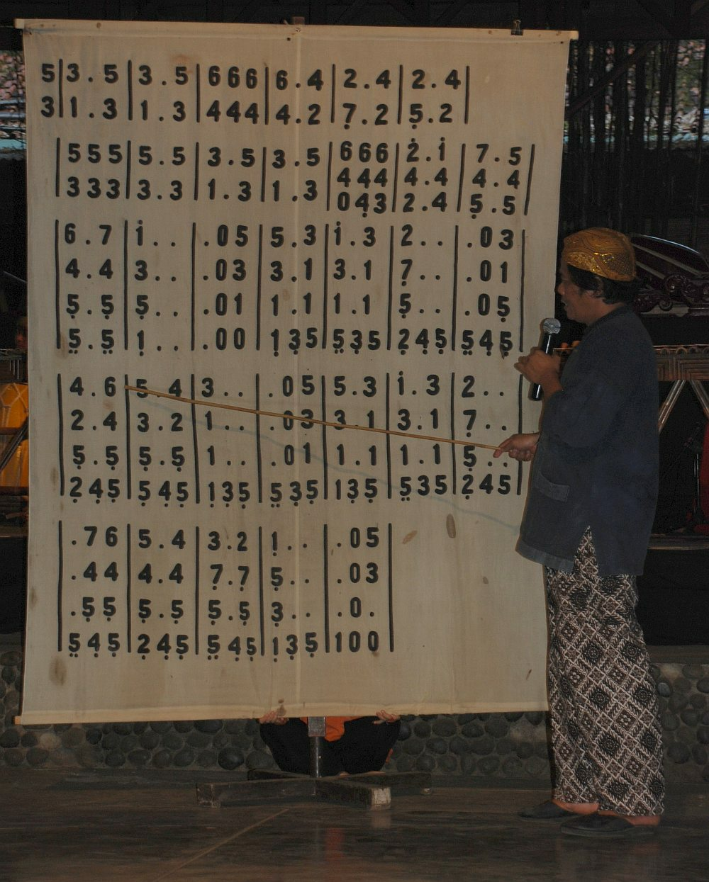 Ein Sohn von Udjo Ngalagena zeigt den Besuchern, welche Noten sie gerade spielen sollen.